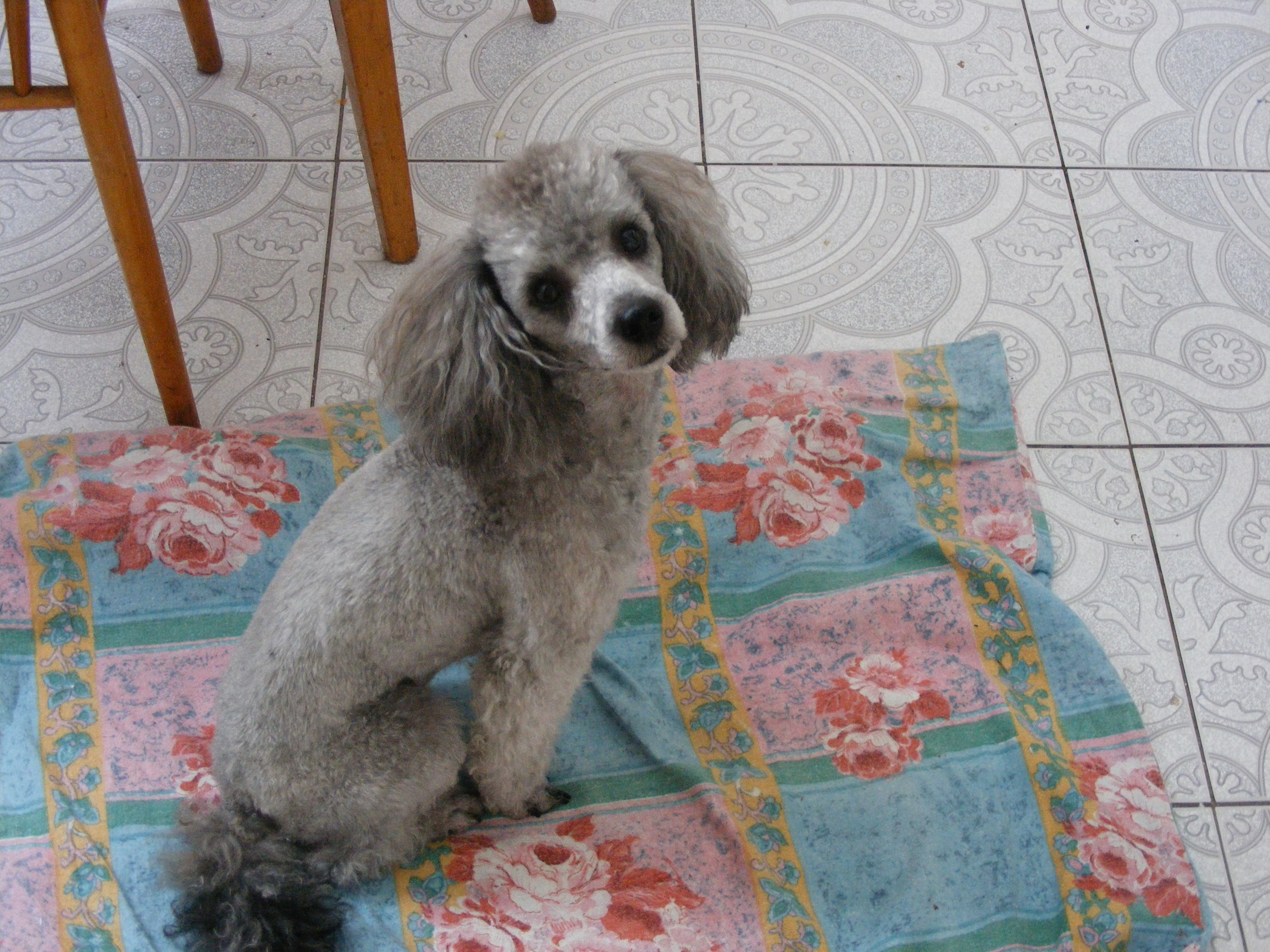 Dog Pudl